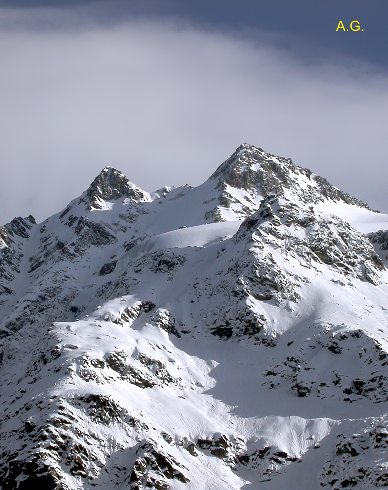 Le Punte Patrì - Alpi Graie - Italy